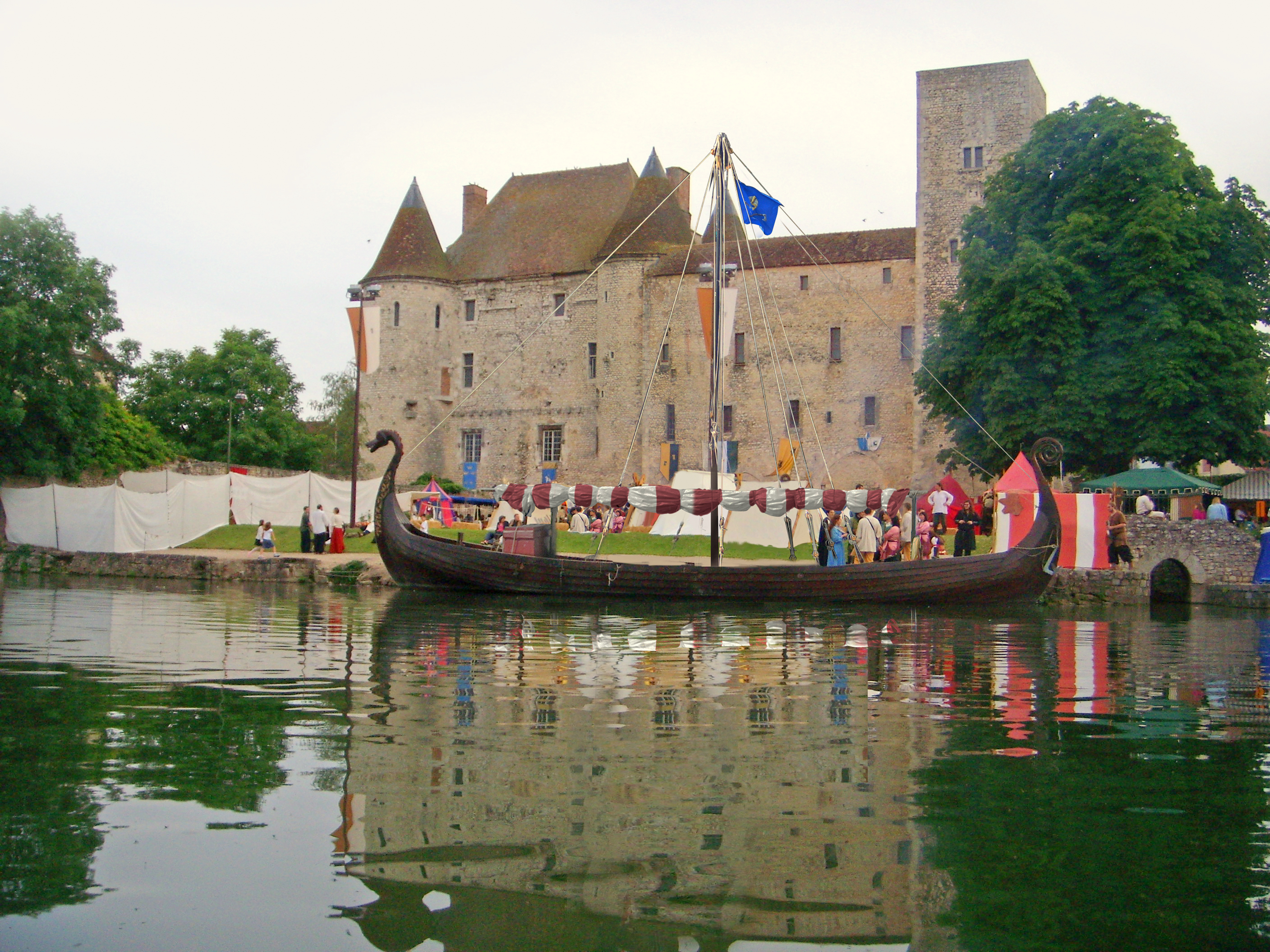 Le bateau viking Gungnir sur le Loing, devant le Château de Nemours